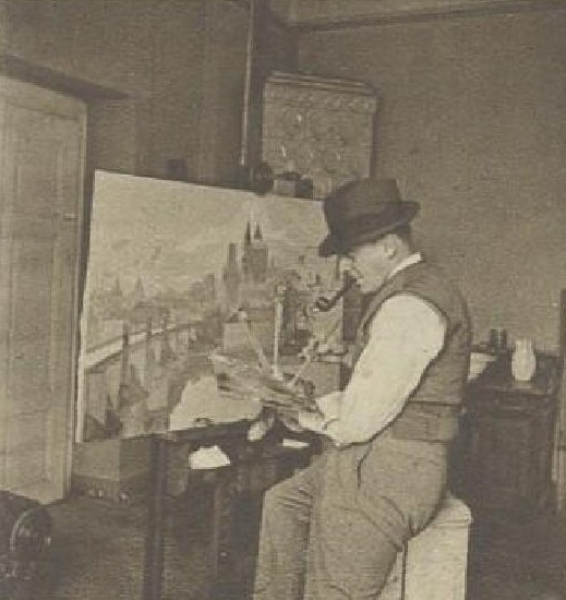 Josef Syrový (1879-1956)